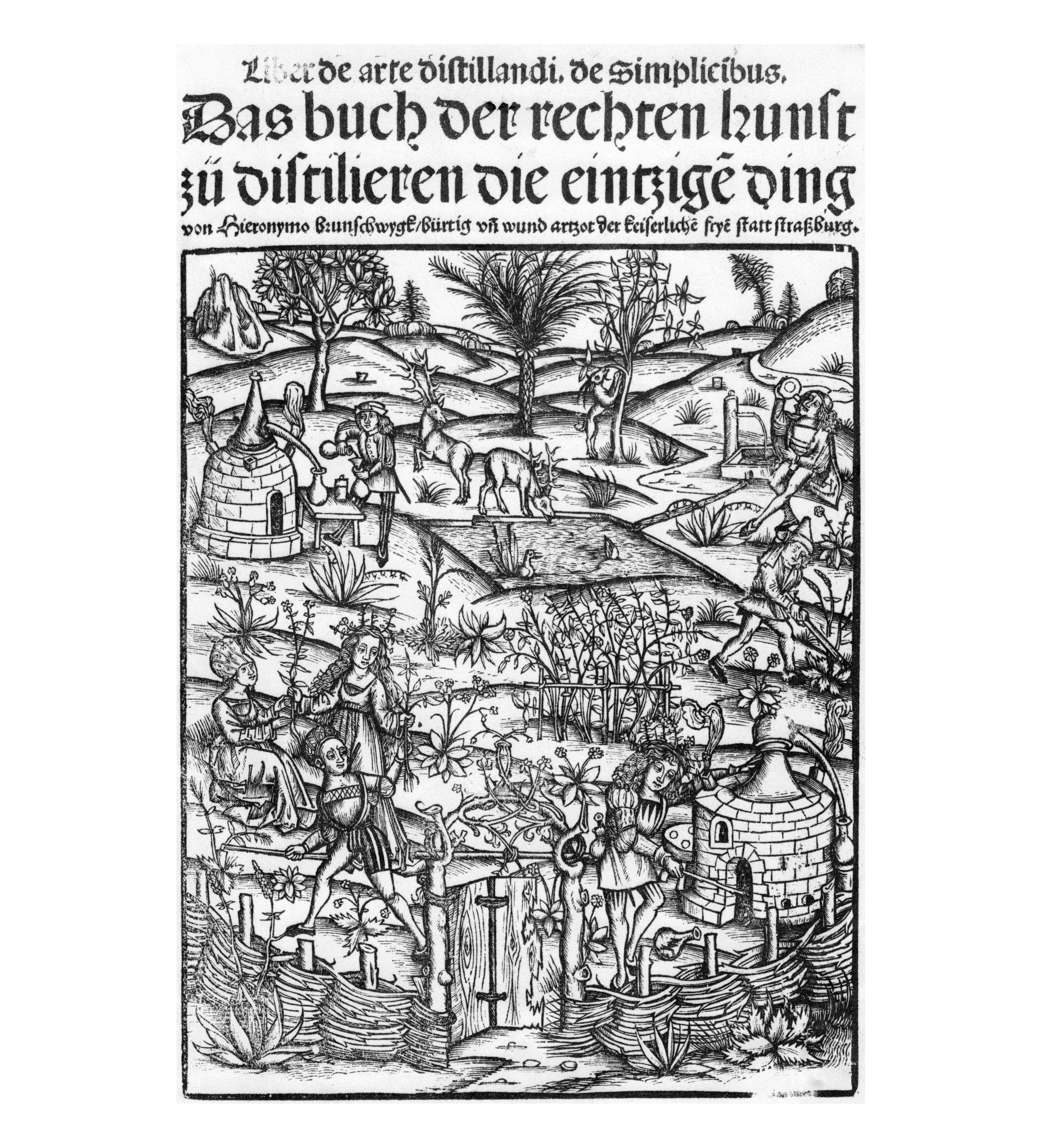 Titelbild Brunschwig 1500